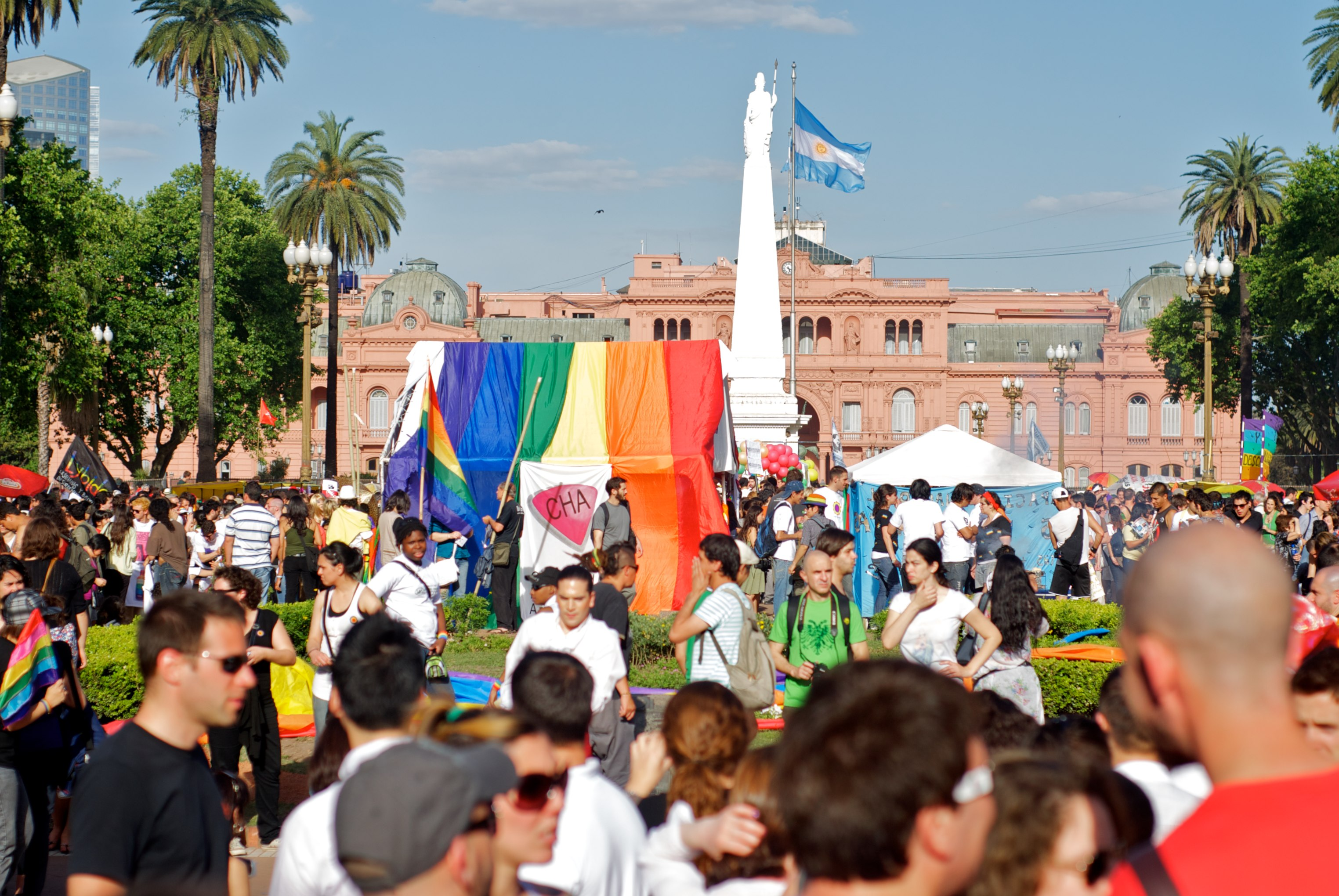 Plaza de Mayo during LGBT pride, 2010